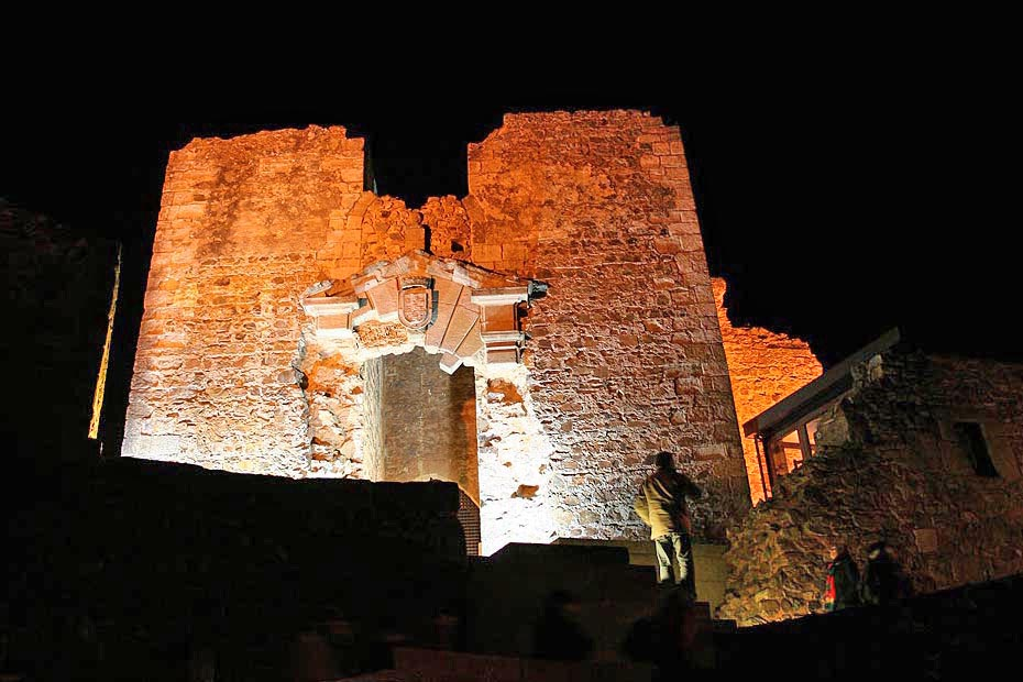 Castelo de Castelo Rodrigo ou Muralhas do Castelo de Castelo Rodrigo